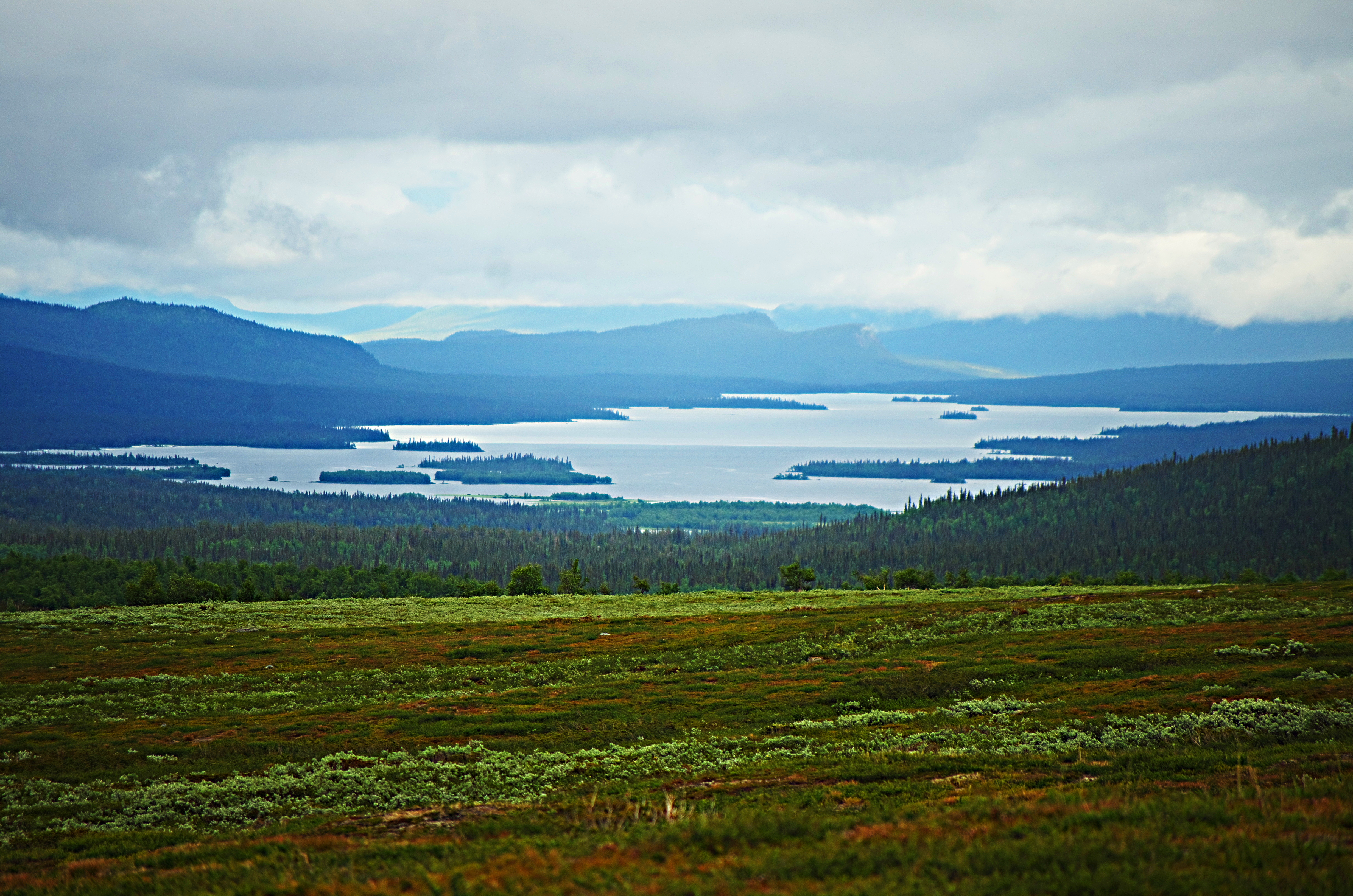 Peuraure (modern stavning Bievrávrre) är en sjö i Jokkmokks kommun i Lappland i Sverige.